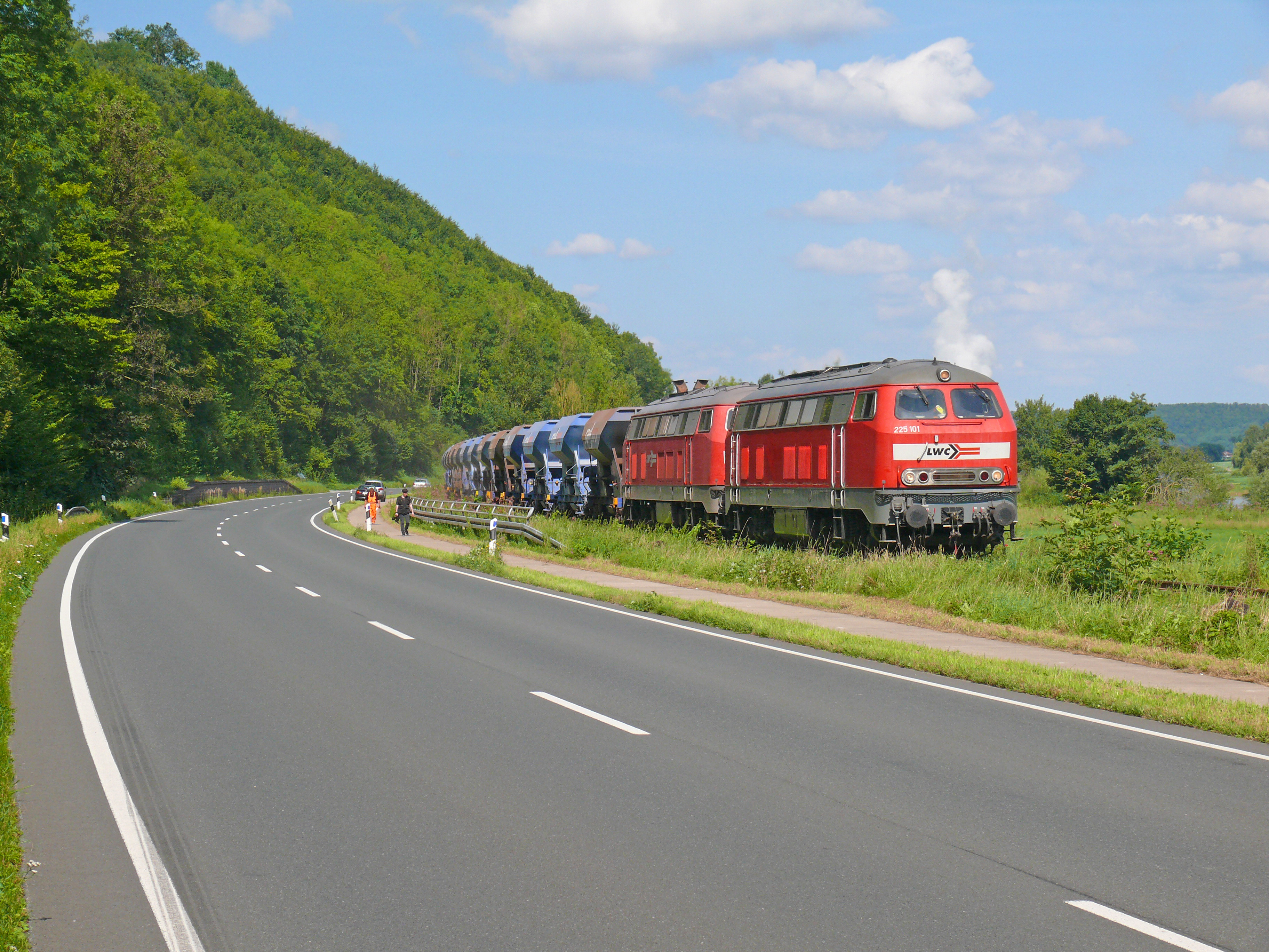 225 101 und 218 450 der LWC ziehen einen Schotterzug zum Einschottern des neu gebauten Gleises neben der B83 zwischen Hehlen und Grohnde